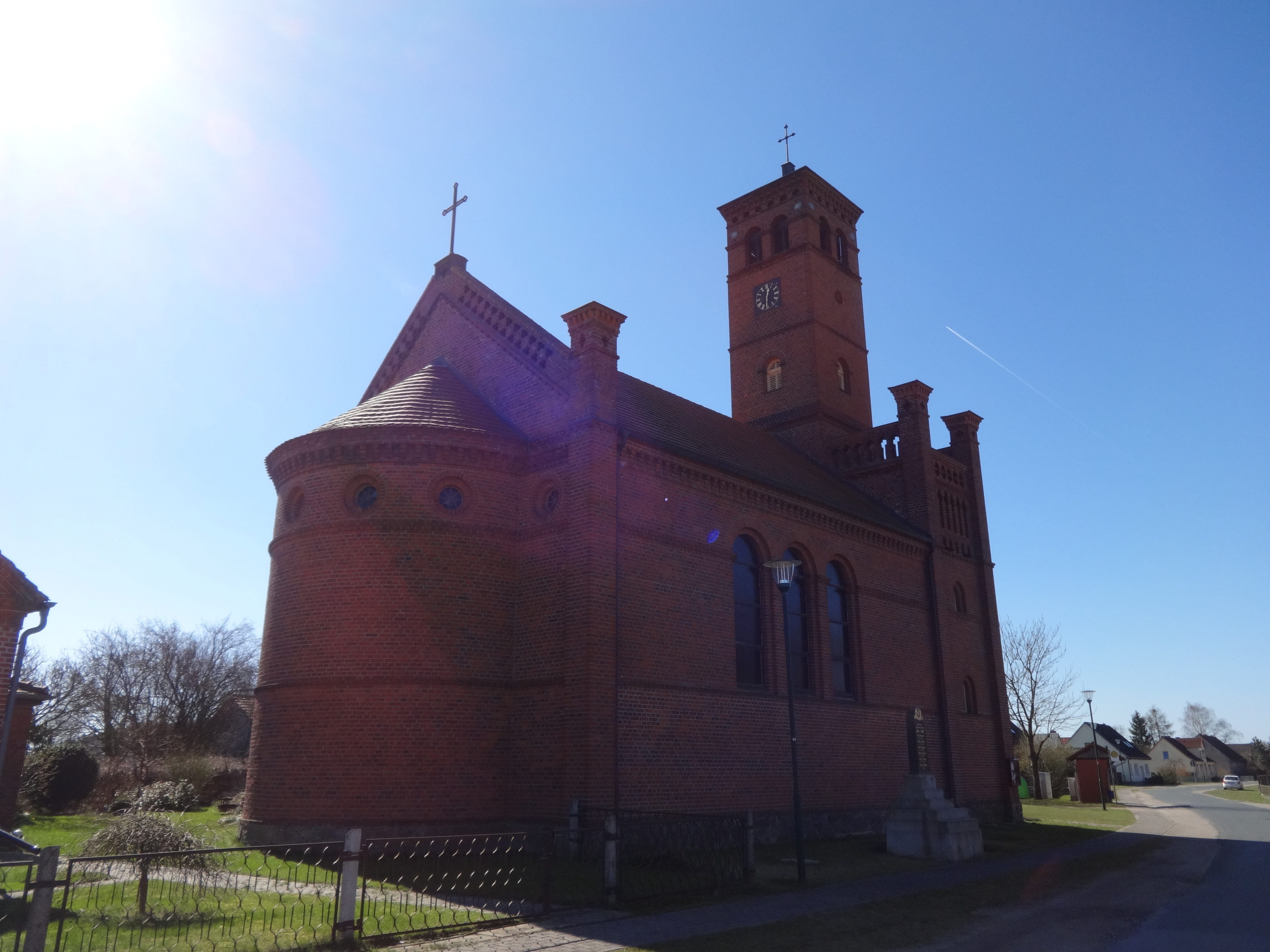 Die Dorfkirche in Christdorf (Wittstock/Dosse) entstand in den Jahren 1835 bis 1837 unter der Leitung von Friedrich August Stüler. In seinem Innern befindet sich eine vollständig erhaltene Ausstattung aus der Bauzeit.